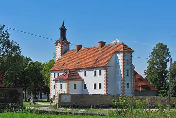 Pałac w Łagowie z 1782 roku.